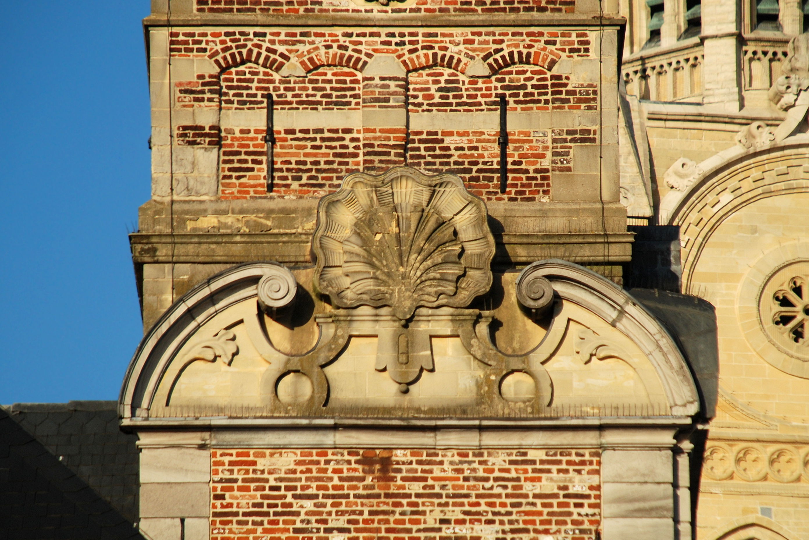 Belgique - Province de Limbourg - Beffroi de Saint-Trond